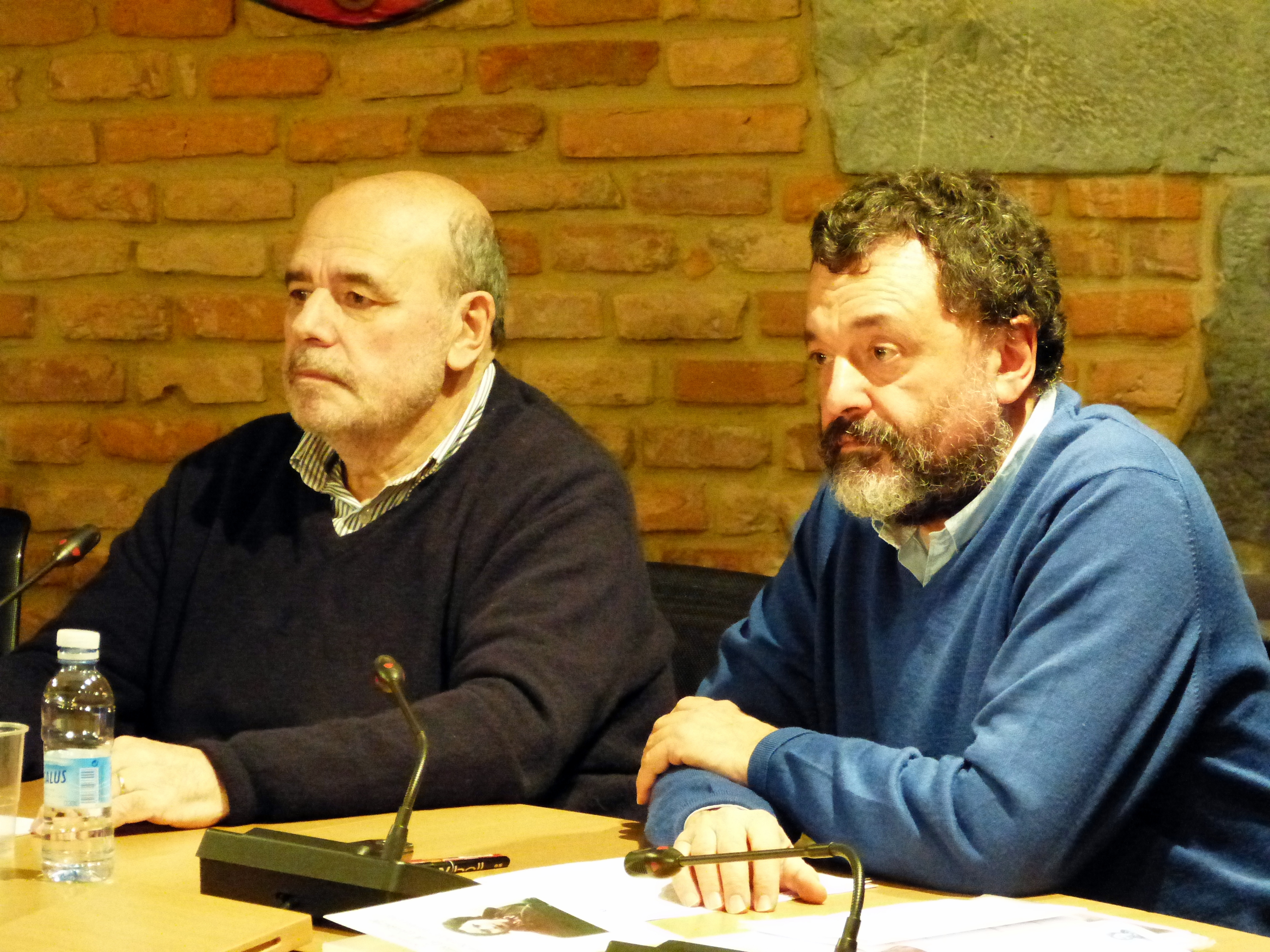 Manuel Aznar eta Jose Angel Ascunce, Tolosako Udaletxean, 2015ean.